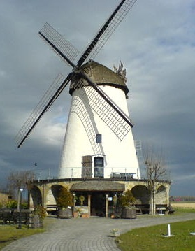 Windmühle am Alten Hellweg